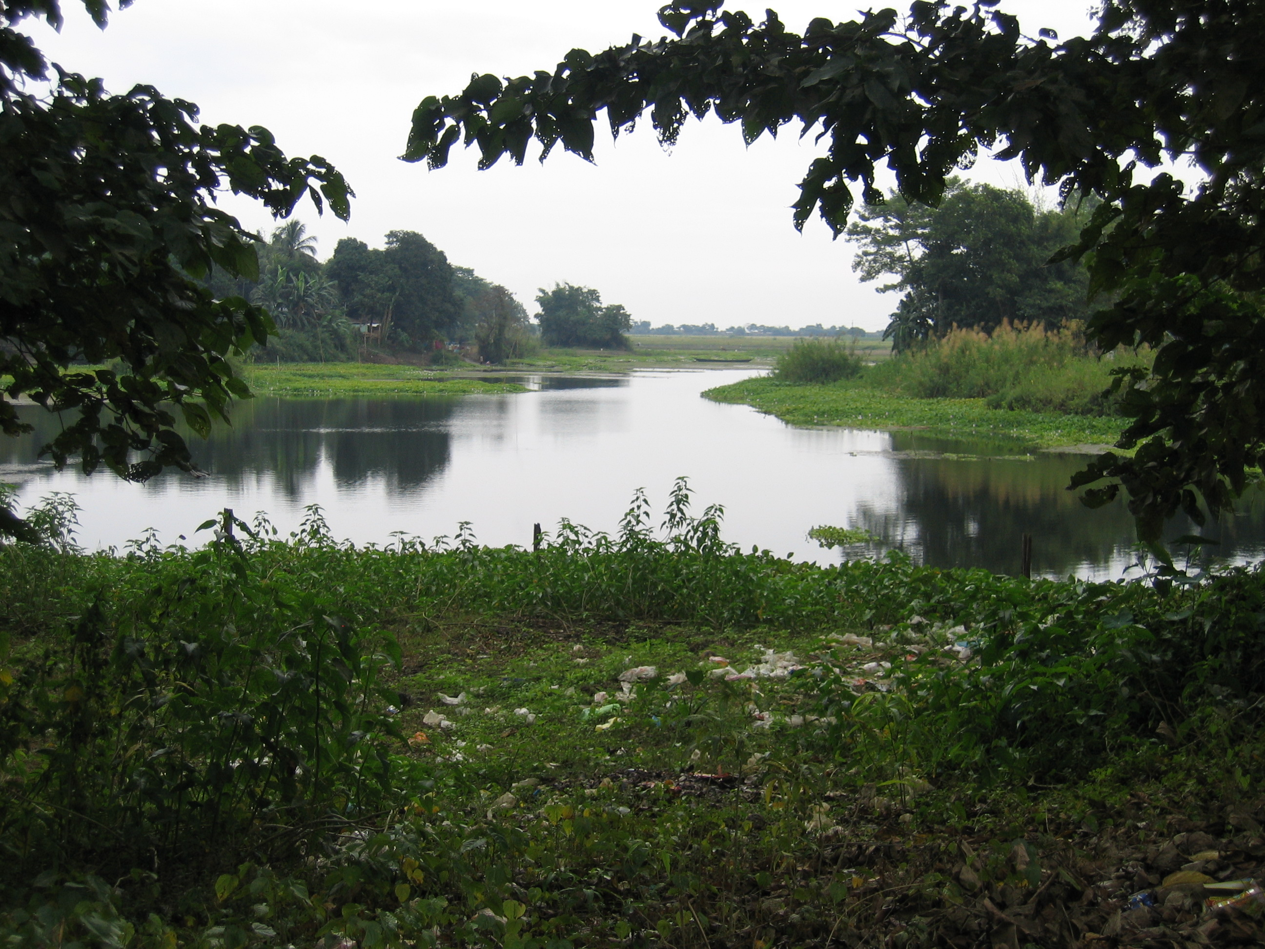 Majulia nature